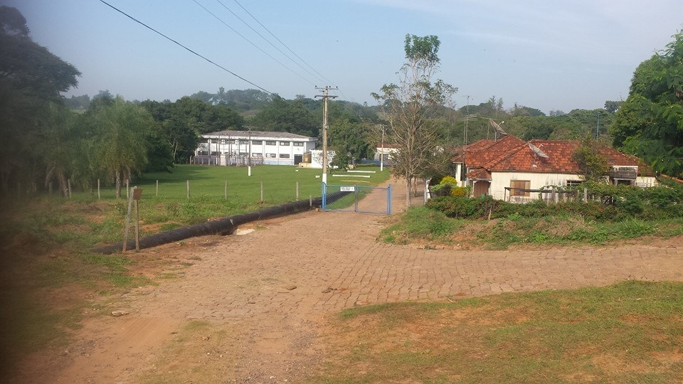 Estação de captação de água do Dae de Bauru nas margens do rio Batalha